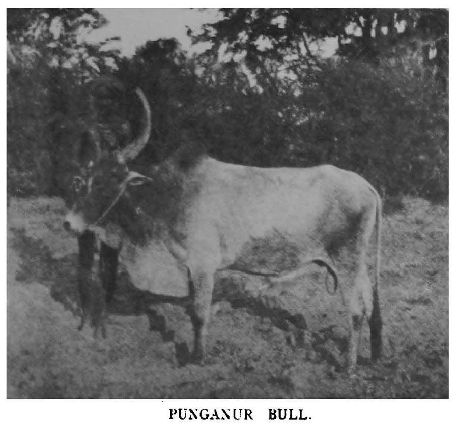 Punganur bull